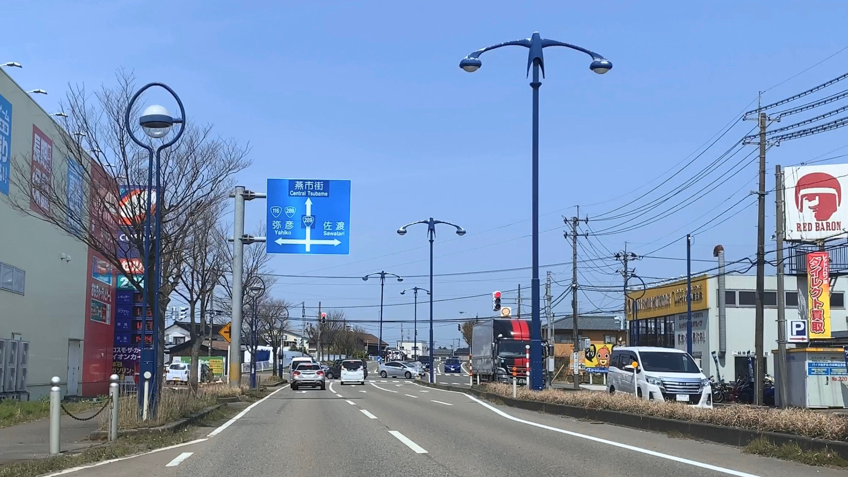 国道289号 燕市井土巻付近。標識に「佐渡（Sawatari）」の表記が見られる（2020年4月）